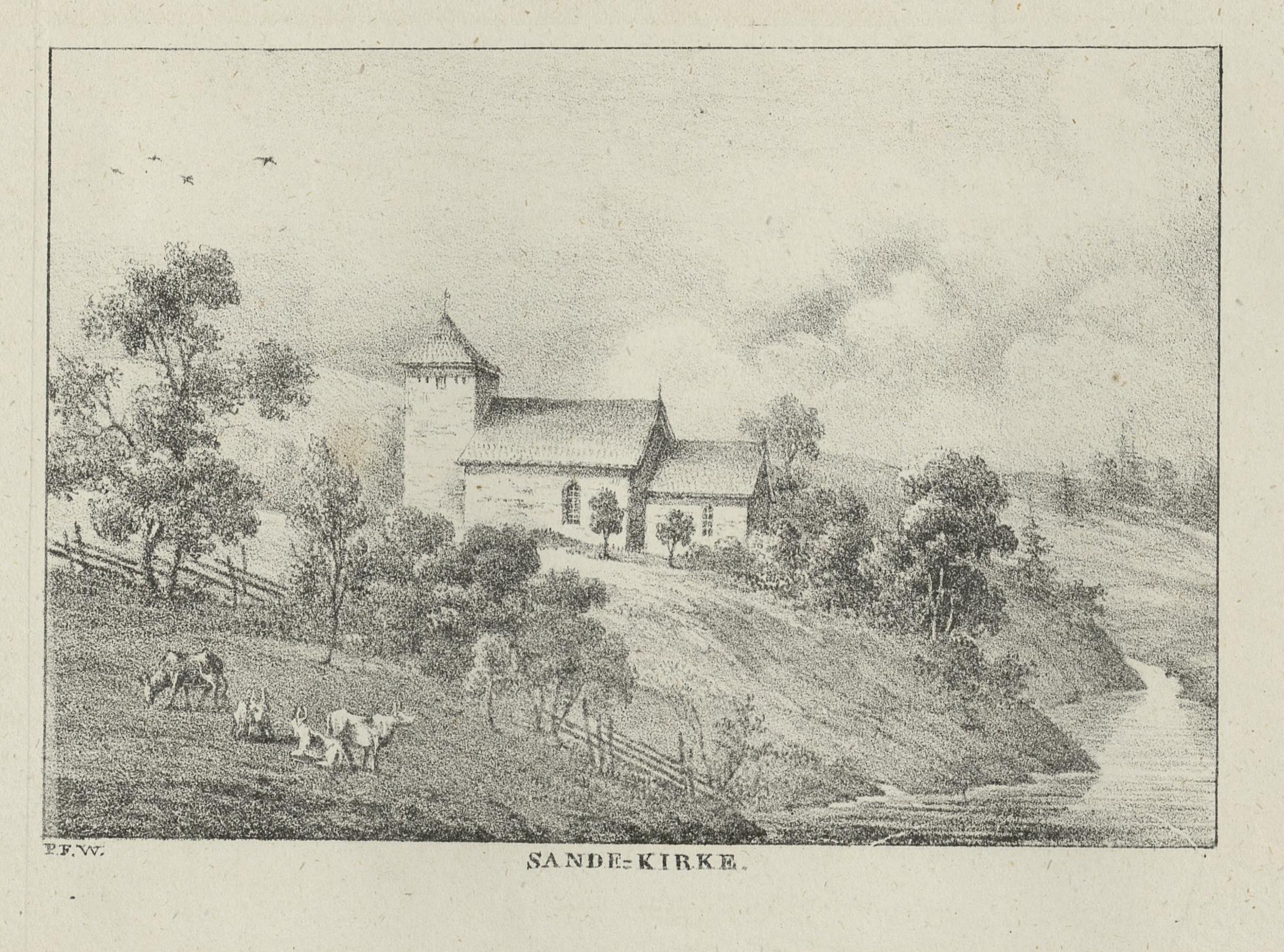 Illustrasjon hentet fra boken "Norge, fremstillet i lithographerede Billeder efter Naturen" av Wergmann, P.F. og utgitt av P.F. Wergmann (Christiania, 1836-1837)